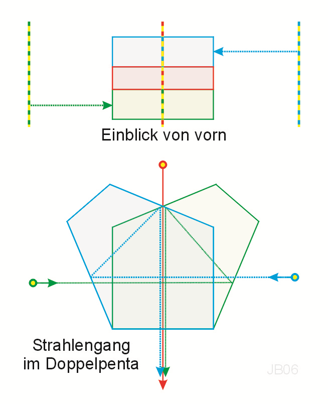 Strahlengang im Doppelpentaprisma wie es in der Vermessung zum Absetzen rechter Winkel verwendet wird. Die Winkel des Strahlenganges sind in der Zeichnung zugunsten einer besseren Erkennbarkeit nicht geometrisch exakt.